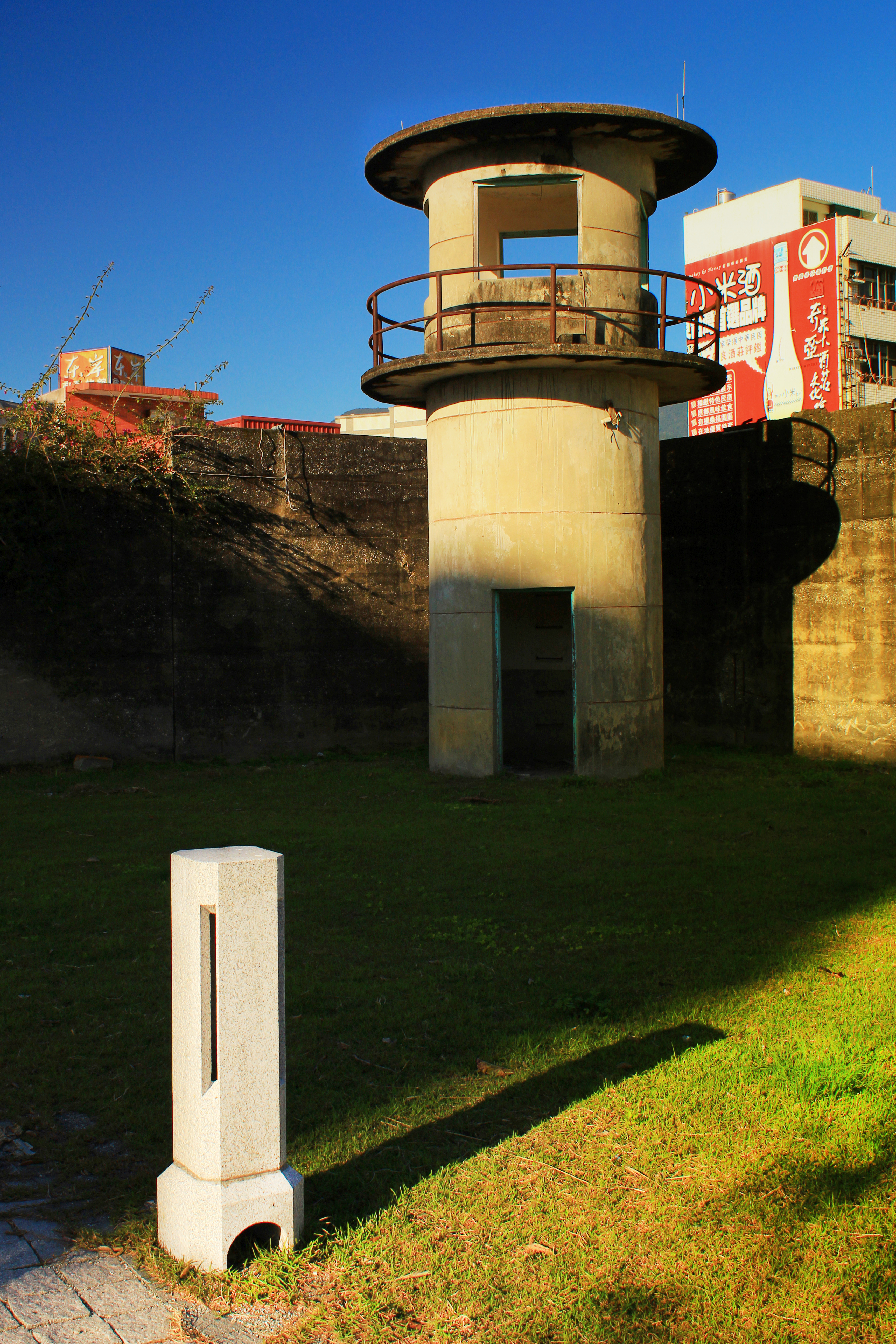 花蓮舊監獄位於今花蓮市國安郵局現址及城垣園現址處，前身為設立於昭和12年(1937)的「臺北刑務所花蓮港支所」，戰後才改為「臺灣第一監獄第二分監」，民國36年4月改稱「臺灣花蓮港監獄」，民國47年始改「臺灣花蓮監獄」，這間監獄收容重刑犯與花東地區受刑人長達四十餘年。